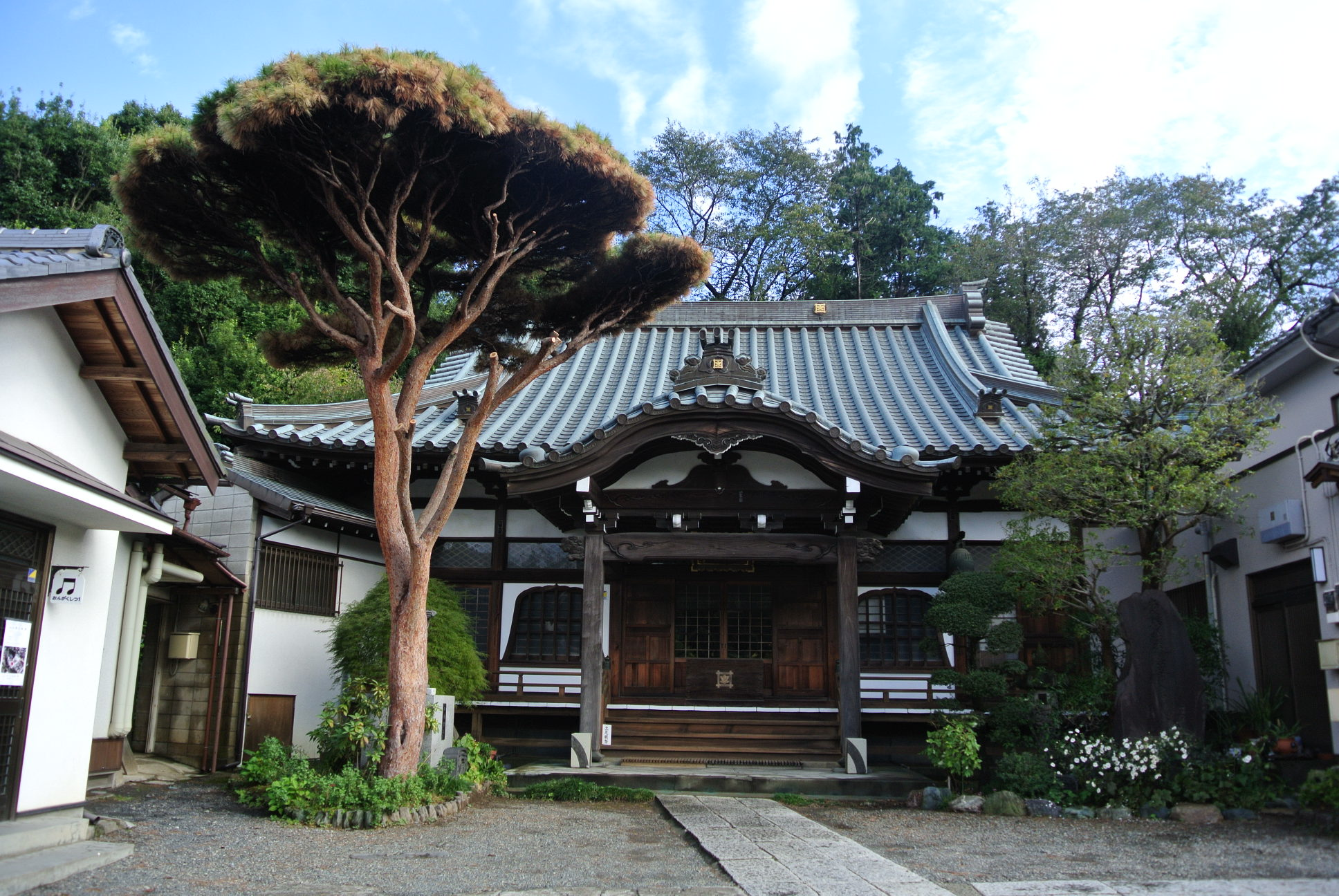 初山１丁目・本遠寺